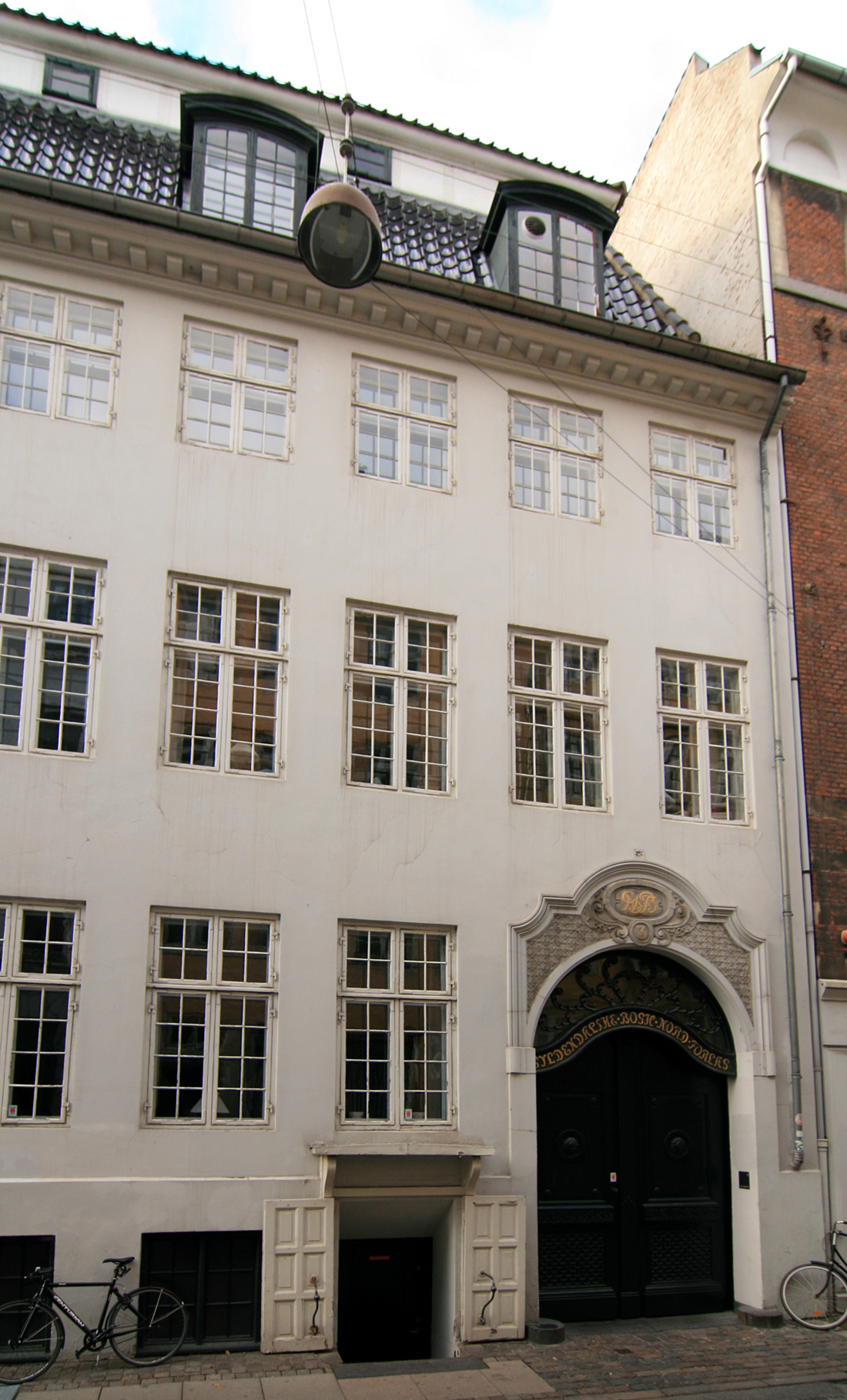 Gyldendal Forlag, Klareboderne 3, København. Bygget 1784. Fredet bygning.